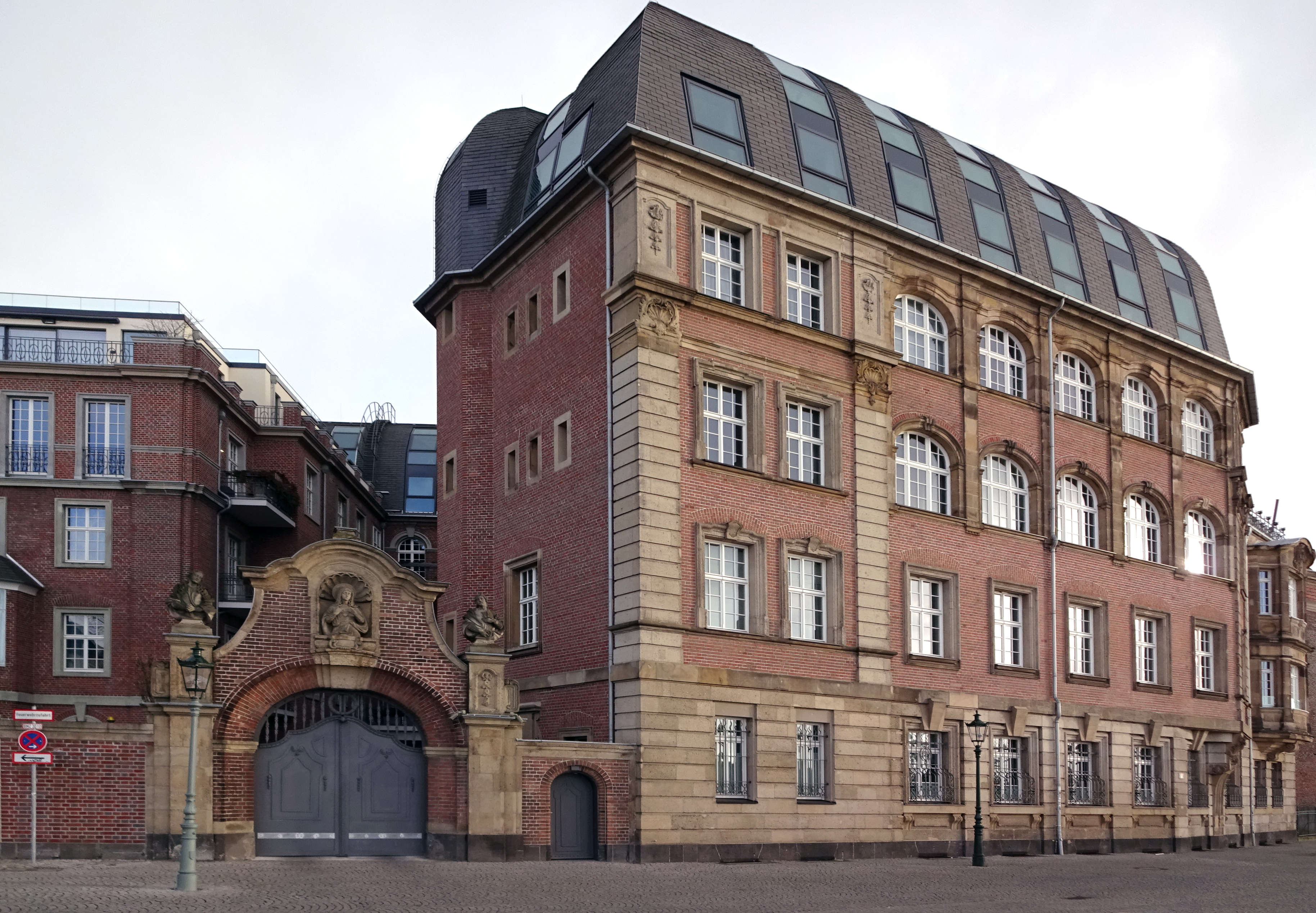 Ehemaliges Theresienhospital, Bauteil zum Rheinufer/Schlossufer